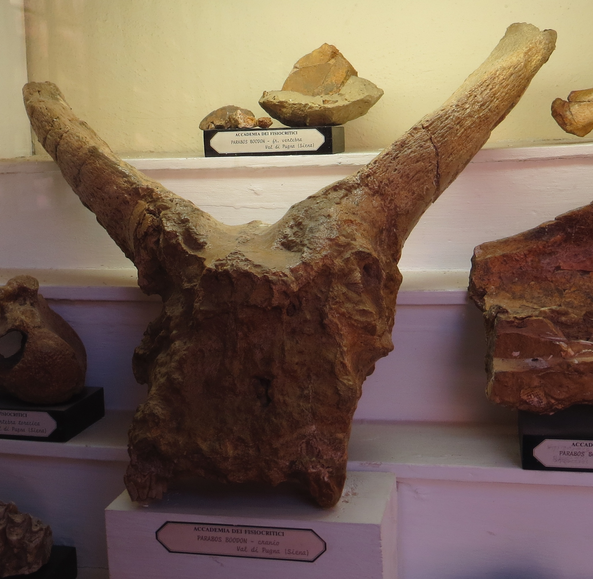 Fossil - Took the picture at Accademia dei Fisiocritici, Siena